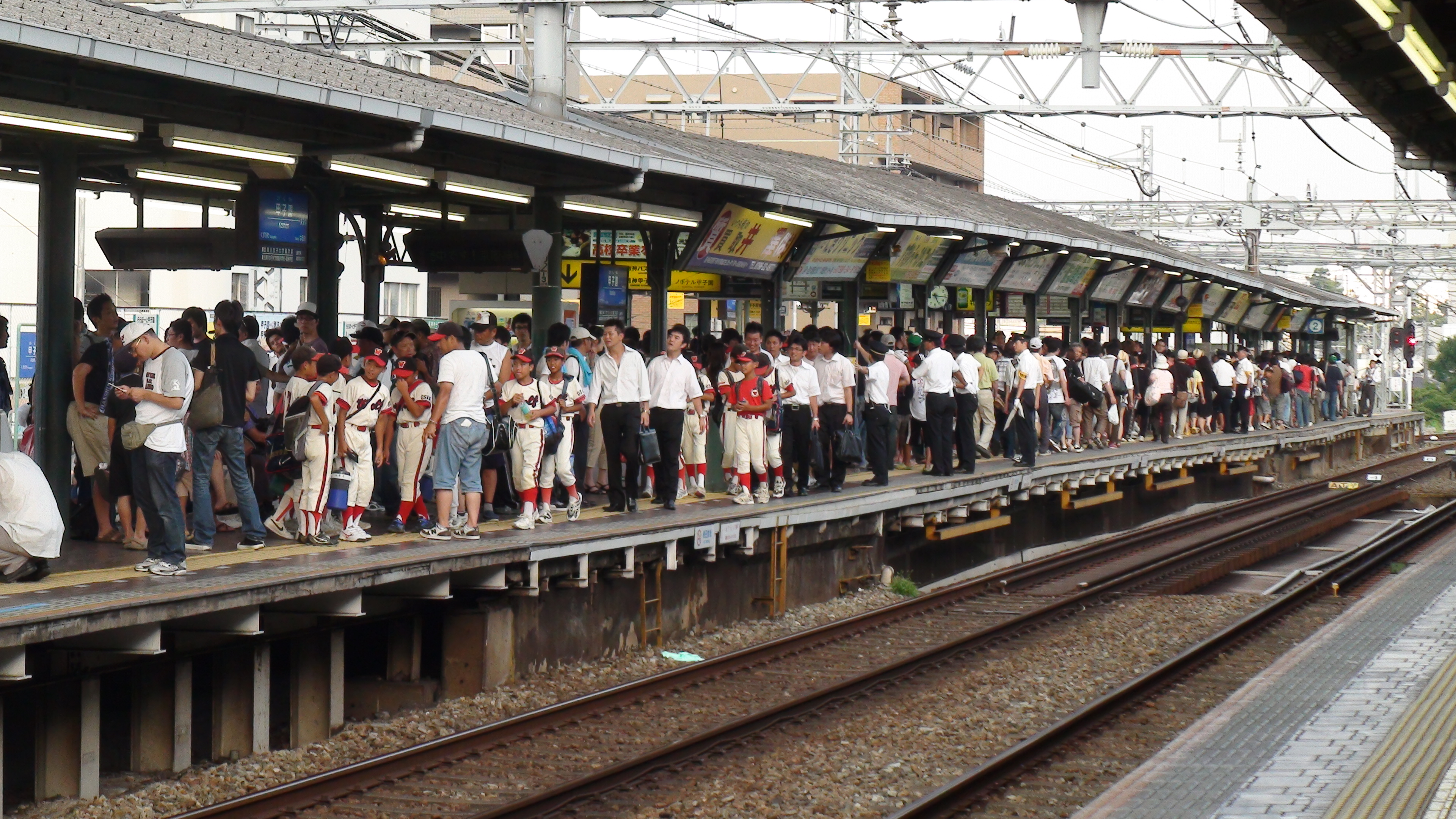 夏の高校野球開催時、混雑する甲子園駅上り線ホーム （2009年8月18日）